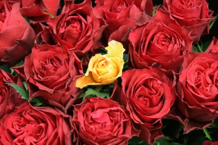 クワトロッソと普通のバラの大きさ